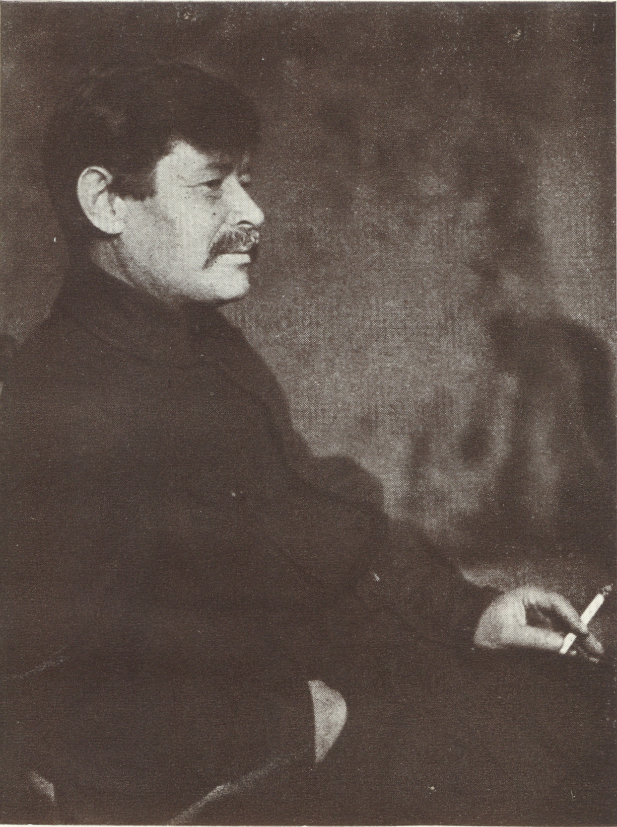 Фотографія